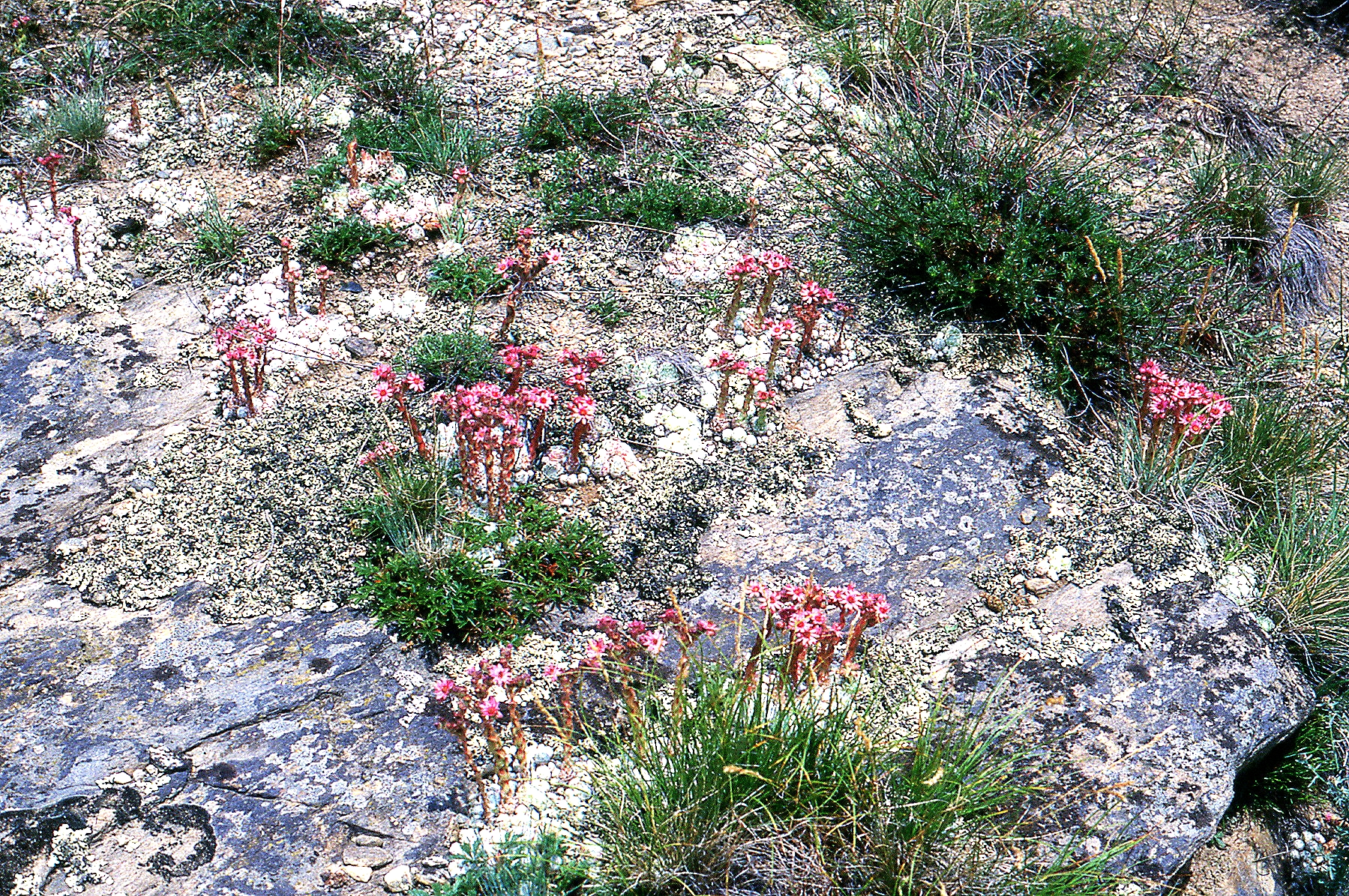 Crassulaceae, Italien, Südtirol, Latsch, am Sonnenberg, Berg-Hauswurz, 1992 Photo: U.Schmidt